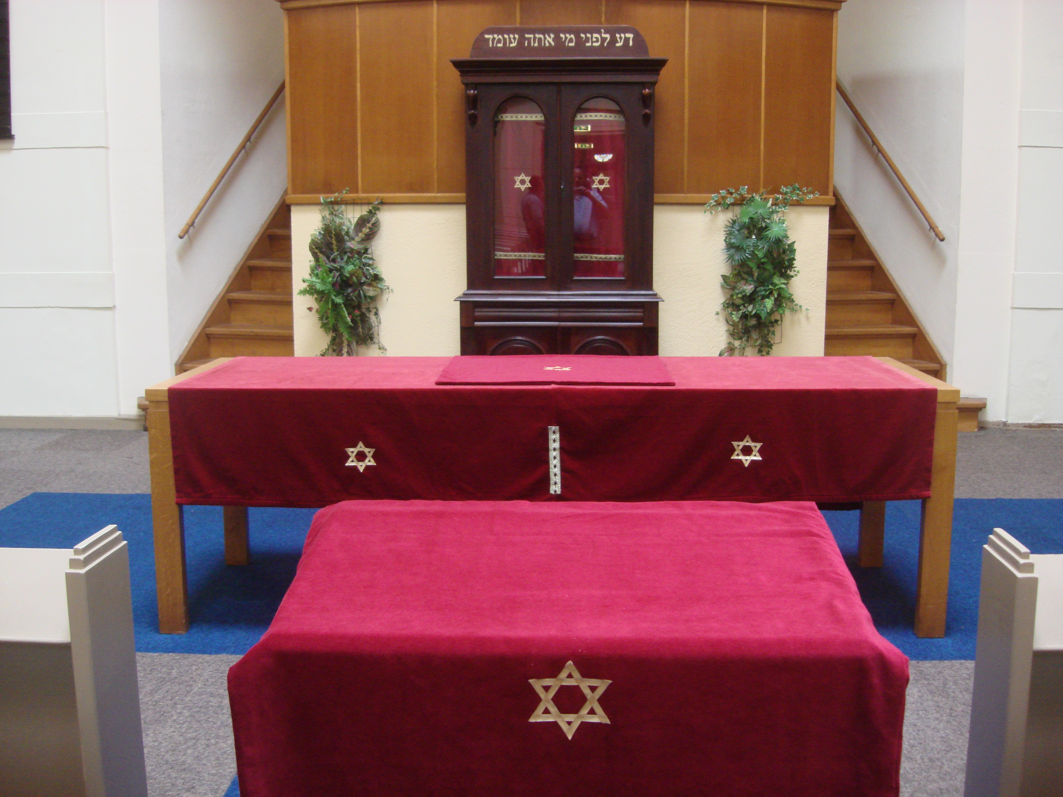 De Aron Hakodesj (Heilige Arke) van de Joodse gemeente Beth Shoshanna in de Grote Synagoge van Deventer, met op de voorgrond de lessenaar van de chazzan (voorzanger) en de leestafel waar de Torahrol op komt te liggen.